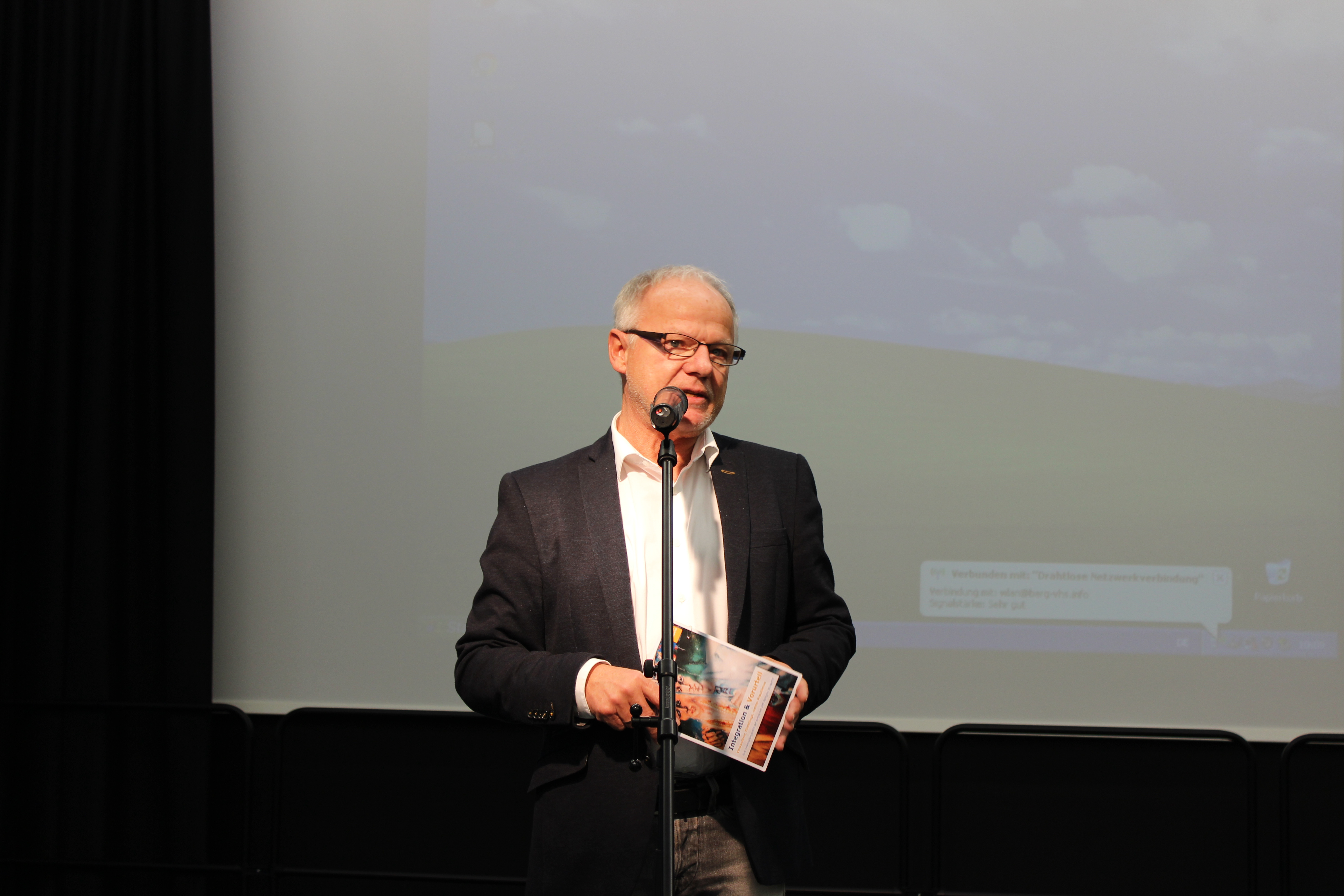 Impressionen Tag 1 / 2 BarCamp Offene Kommunen.NRW 2015 / OKNRW (14.-15.11.15, Wuppertal) Quellenangabe bei Verwendung (Bitte Lizenz beachten): "Foto: Katja Evertz / Cortex digital" Barcamp in Wuppertal (opengovernment openData oknrw)